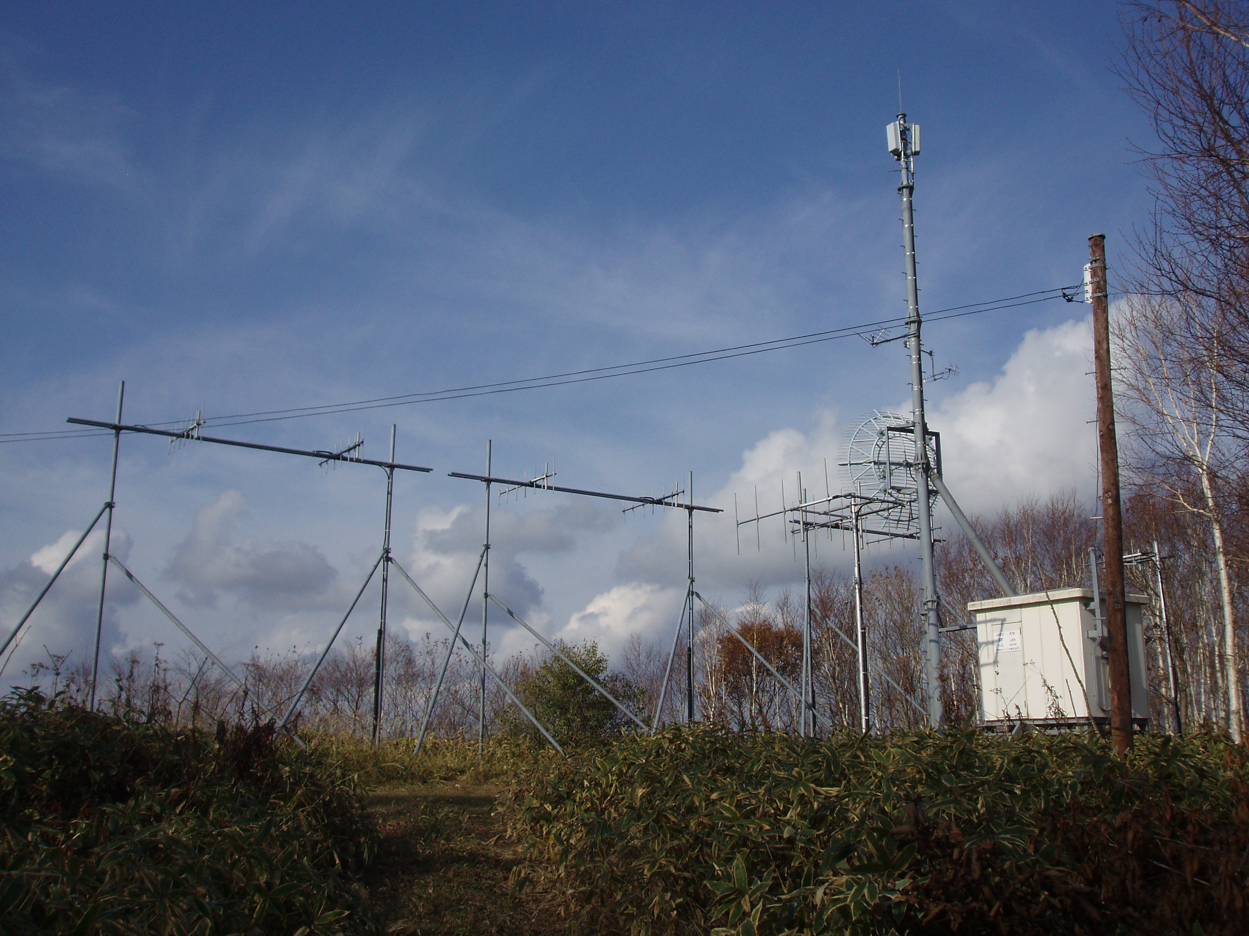 西様似中継局